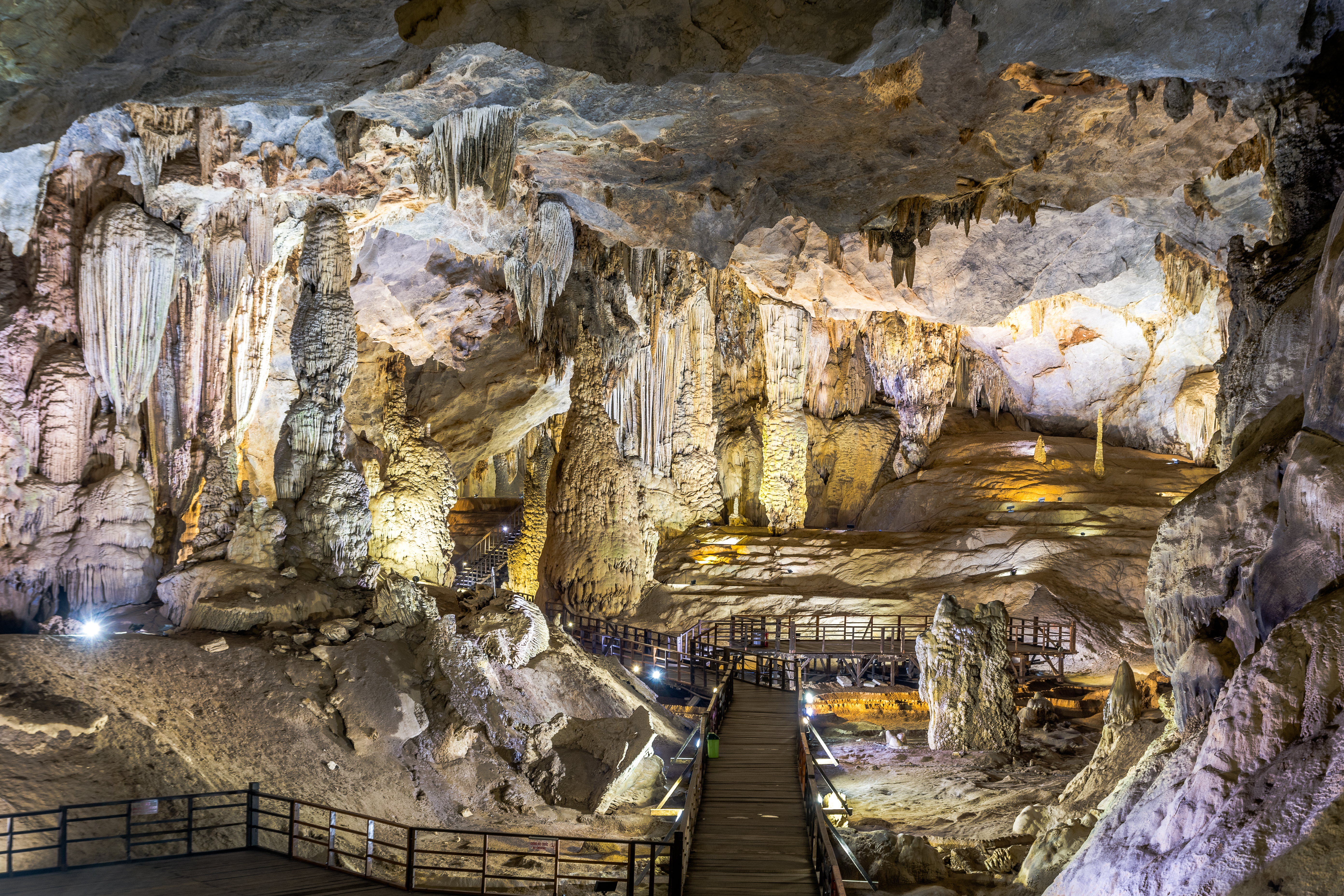 Les grottes du parc de Phong Nha-Ke Bang